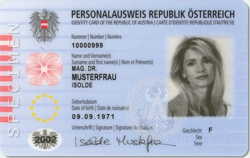 Österreichischer Personalausweis (Muster) - Austrian identity card